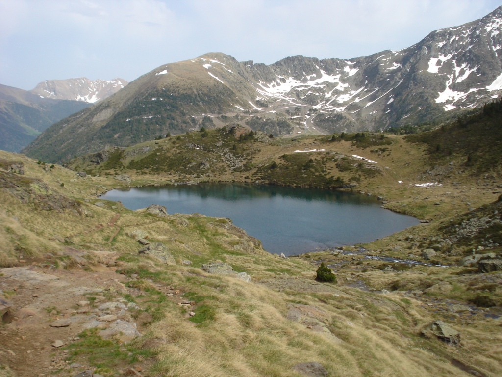 Estany Primer (Ordino) This is a a photo of a lake or pond in Andorra with id: IEA-BE-172